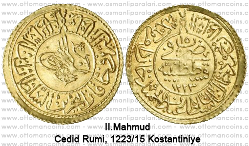 ÖN YÜZ (ortada) Tuğra, (çevrede) Sultan ül berreyn ve hakan ül bahreyn es sultan ibn es sultan (Karaların sultanı ve denizlerin hakanı, sultanların sultanı) ARKA YÜZ (ortada) 12 darebe fi Kostantiniye 1223, (çevrede) es sultan Mahmud Han bin es sultan Abdülhamid Han dame mülkhe (1223'de Kostantiniye'de basıldıi 12, Abdülhamid Han'ın oğlu sultan Mahmud Han, mülkü daim olsun)